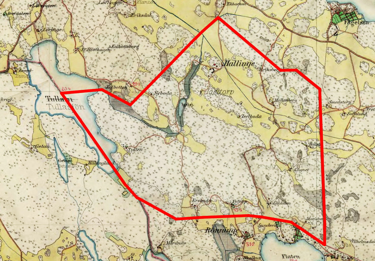 Hallinge gårds ägor (röd gränslinje)